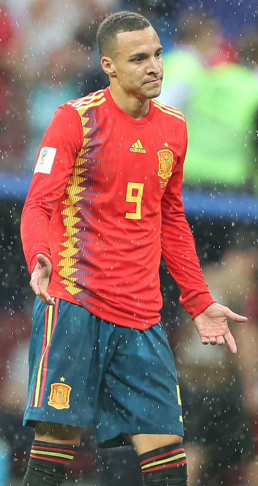 История творится на наших глазах! Россия бьет Испанию в серии пенальти